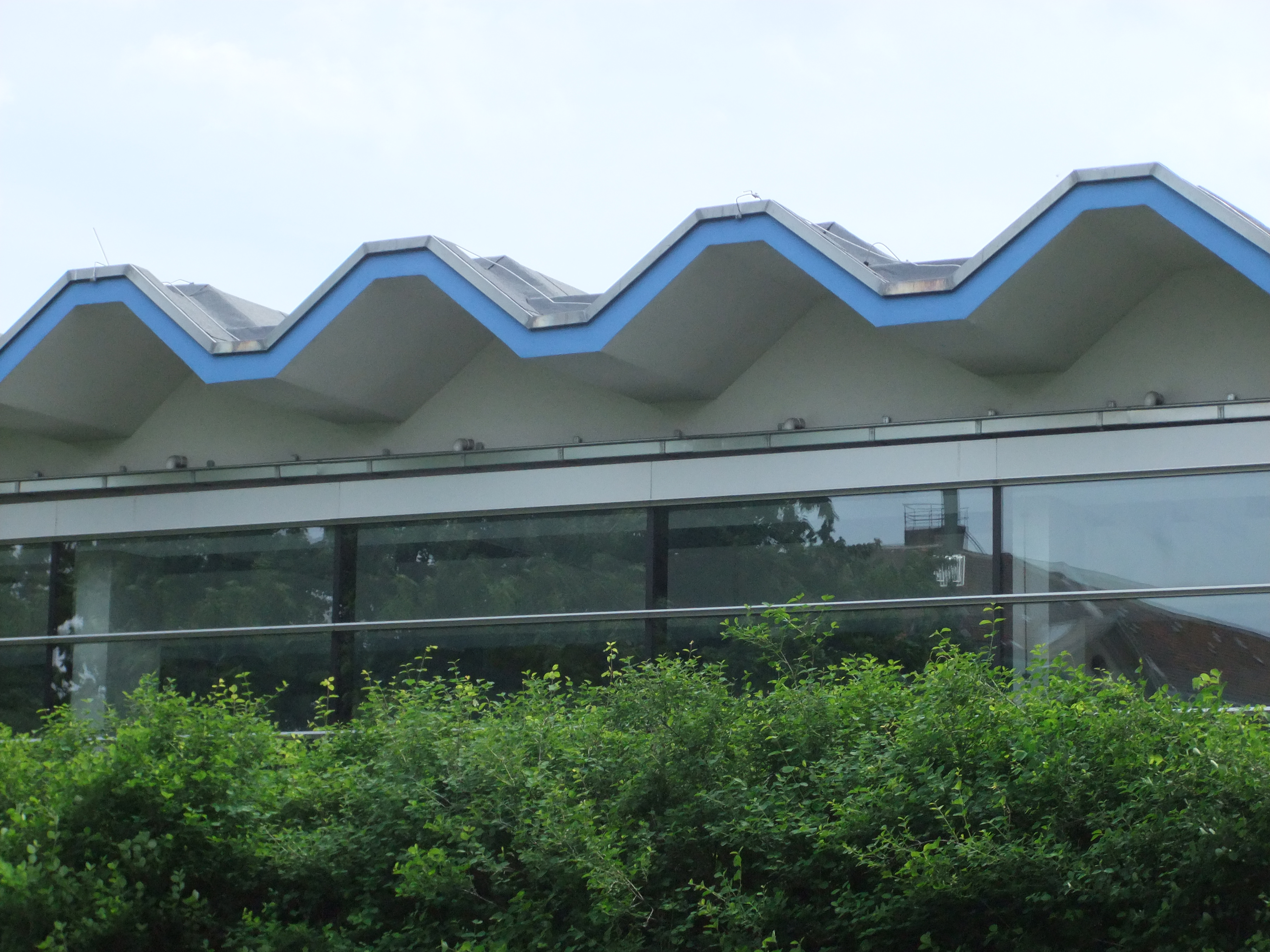 Die Schwimmhalle Fischerinsel in Berlin nach der Renovierung mit VT-Falten